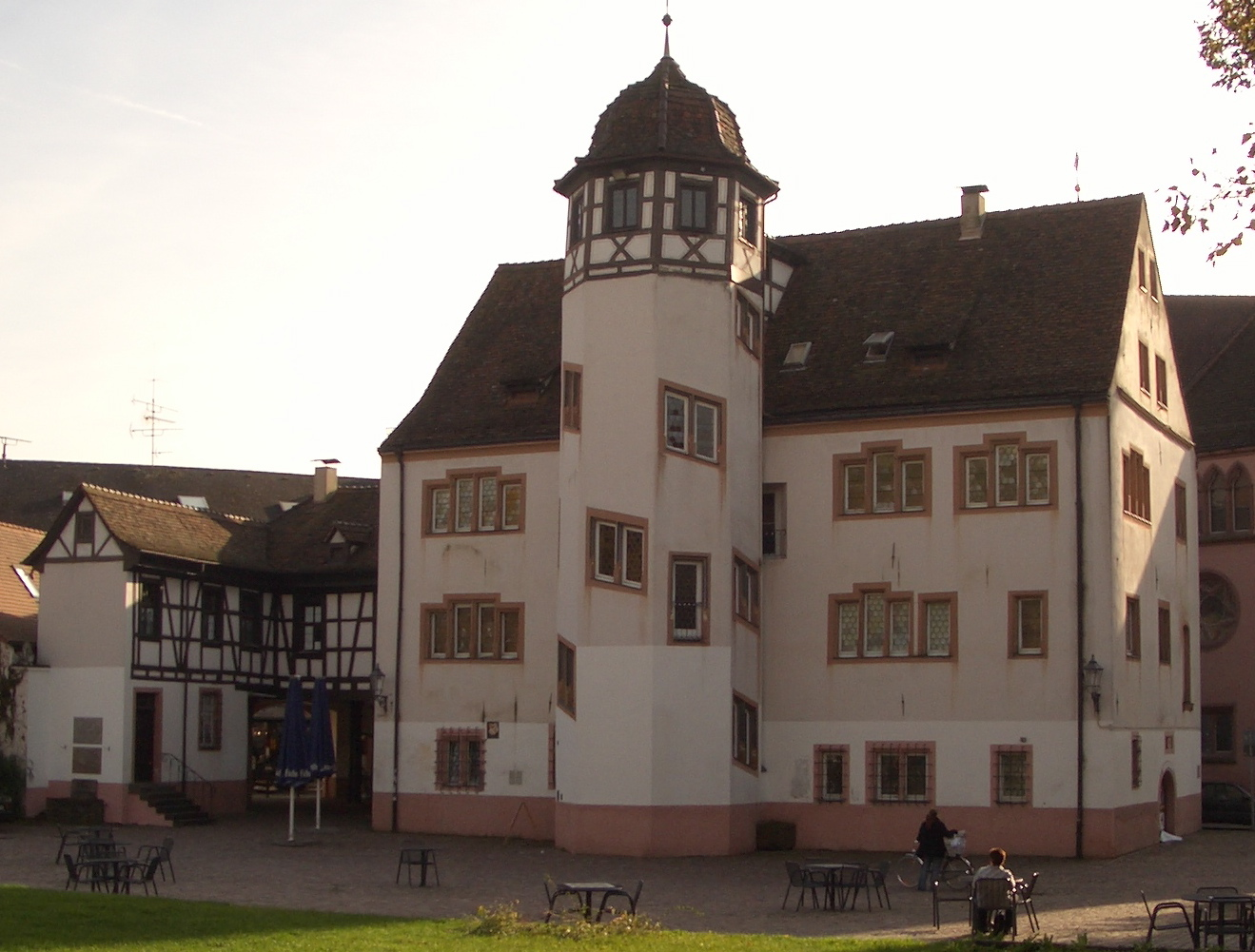 Markgrafenschloss in Emmendingen. Das heutige Schloss war ursprünglich ein Wirtschaftshof des Klosters Tennenbach. Nach mehreren Besitzerwechseln erwarb der Markgraf Jacob III. von Baden-Hachberg 1588 den Wirtschaftshof und baute sich das Areal zu seiner Residenz in Emmendingen aus. 1584 heiratete der 22-jährige badische Markgraf Jakob III. die 16-jährige Reichsgräfin Elisabeth von Pallandt-Culemborg. Sie war Alleinerbin eines sehr großen Vermögens. In der nur sechs Jahre dauernden, glücklichen Ehe wurden vier Kinder geboren. 1588 zog das Paar von der Hochburg (Emmendingen) in die kleine Emmendinger Residenz. Am 1. Januar 1590 verlieh Jakob III. dem bisherigen Marktflecken Emmendingen die Stadtrechte. Das Schloss und neue Gebäude entstanden im damals vorherrschenden Baustil. Nachdem Jacob III. am 15. Juli 1590 zum katholischen Glauben übergetreten war, fiel er mit großer Wahrscheinlichkeit einem Giftanschlag zum Opfer und starb am 17. August im Markgrafenschloss. Nach Jacobs Tod blieb das das Schloss Sitz der markgräflichen Land- und Burgvögte.